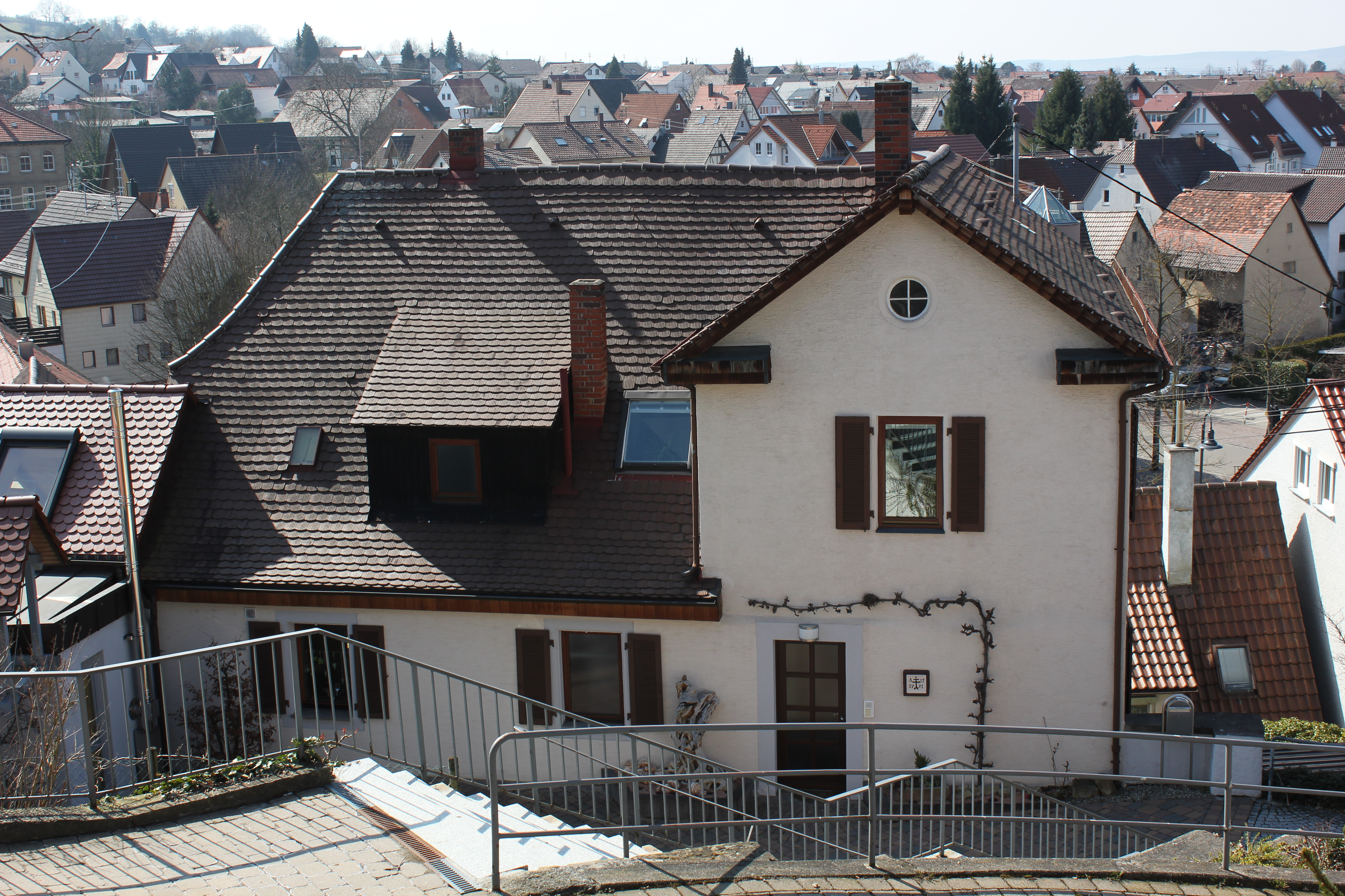 Altes Pfarrhaus Flein Ostseite, gesehen vom Vorplatz der St. Veit-Kirche